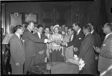 Alfredo Gómez Morales y Eva Perón reciben una donación para la Fundación Eva Perón.